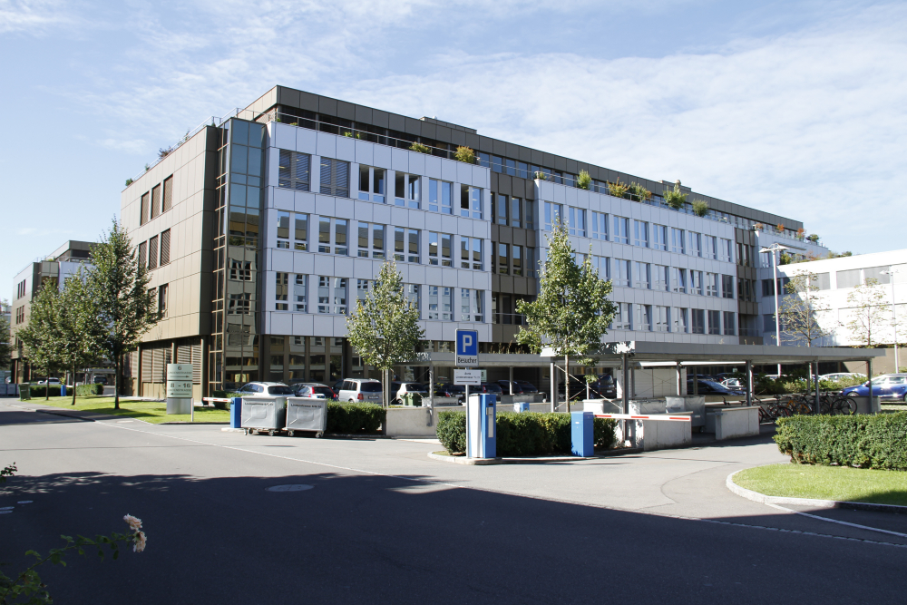 Der Sitz der Forbo Holding AG befindet sich in Baar im Kanton Zug, Schweiz.